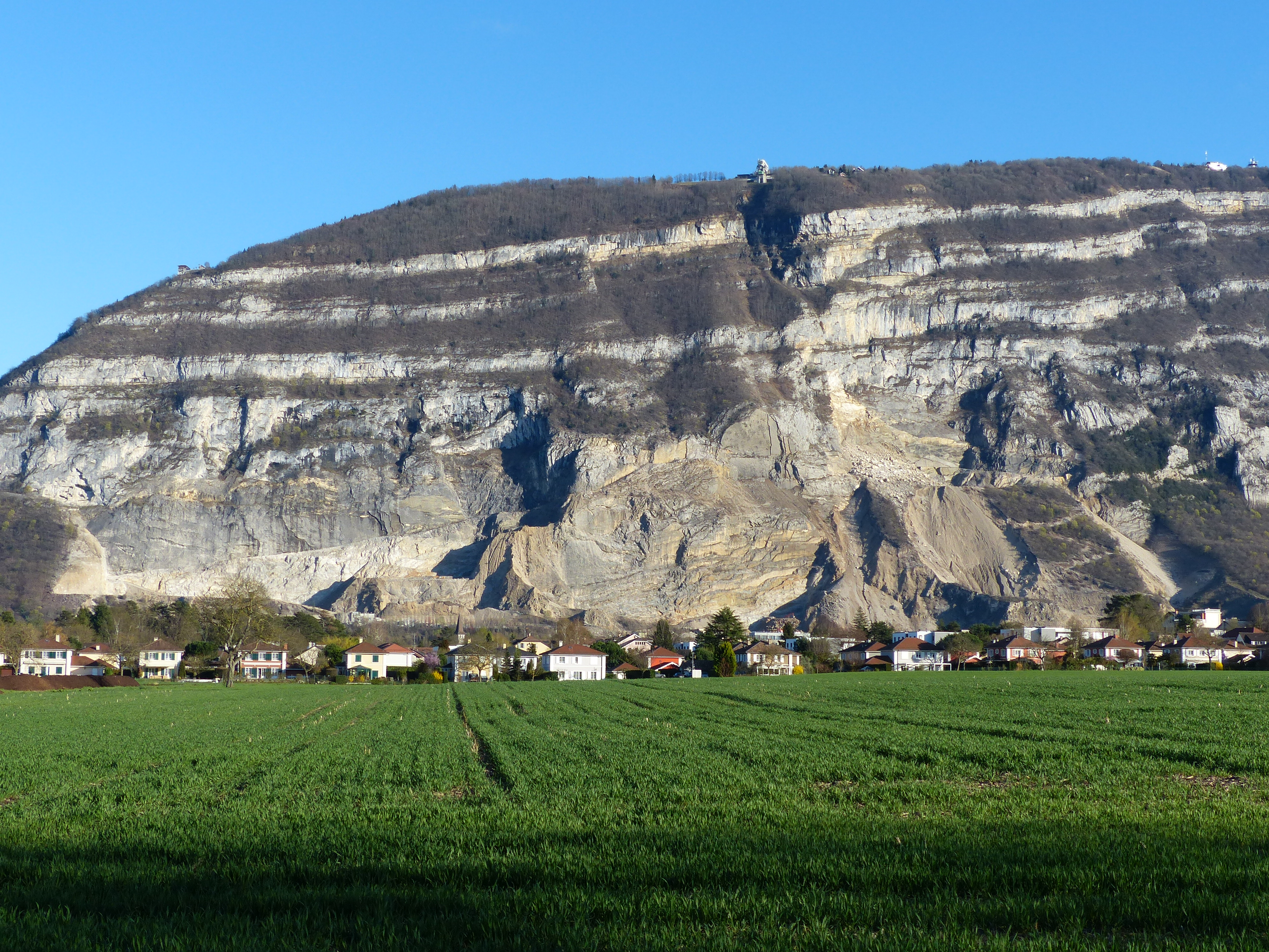 Veyrier et les carrières du Salève vues de la route du Stand-de-Veyrier, Veyrier, canton de Genève, Suisse.